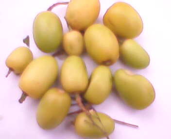 == లైసెన్సింగ్ ==